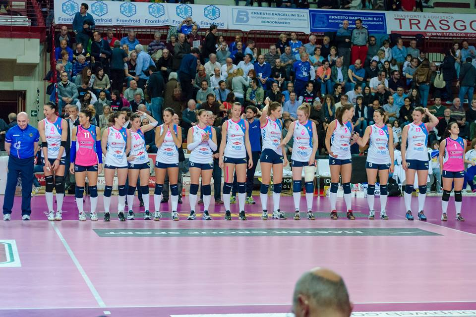 Stagione 2013-14